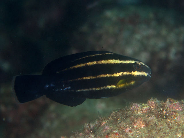 ナンヨウブダイ Chlorurus microrhinos